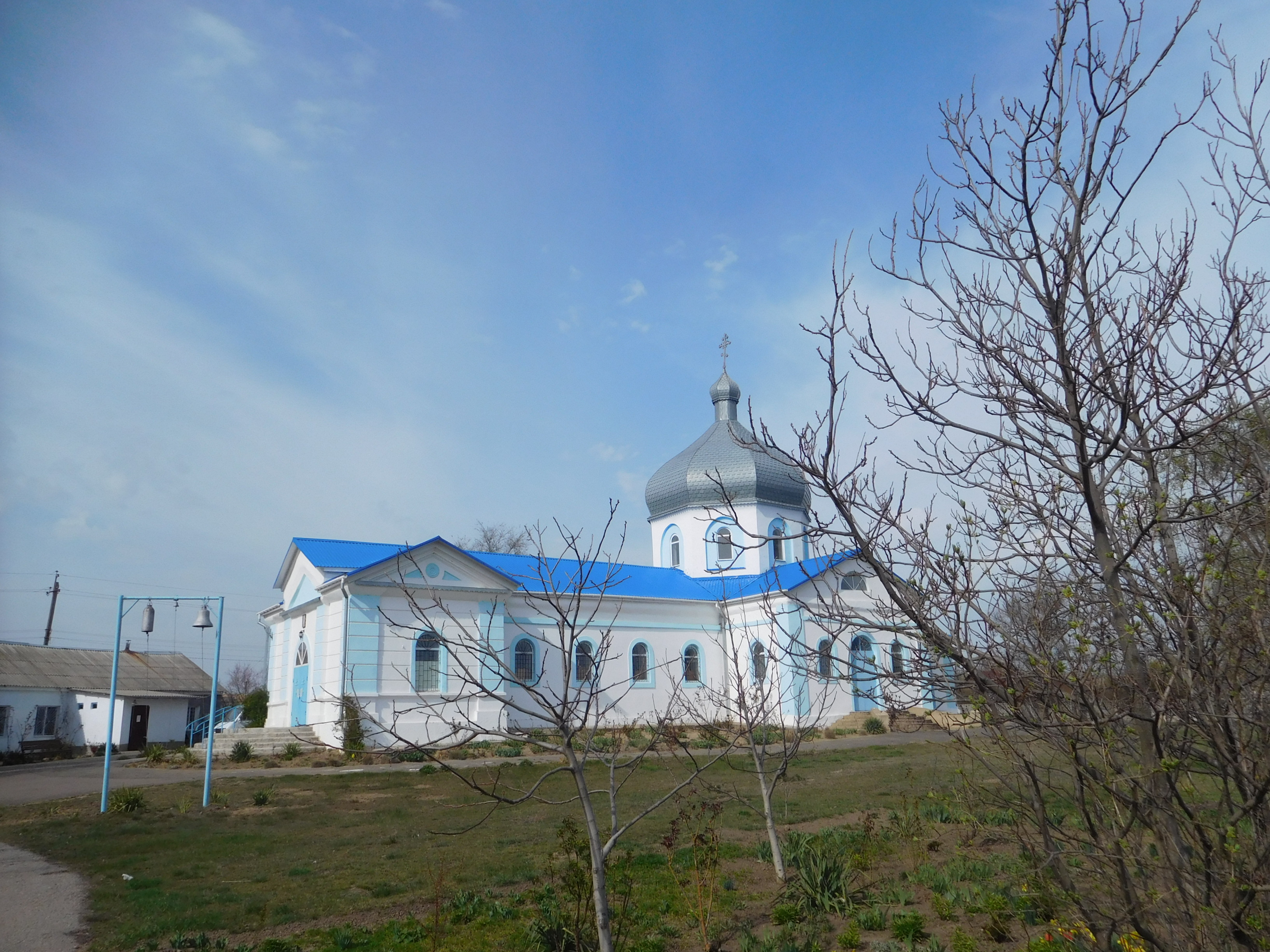 Церква Різдва Богородиці, с. Градениці, Одеська область